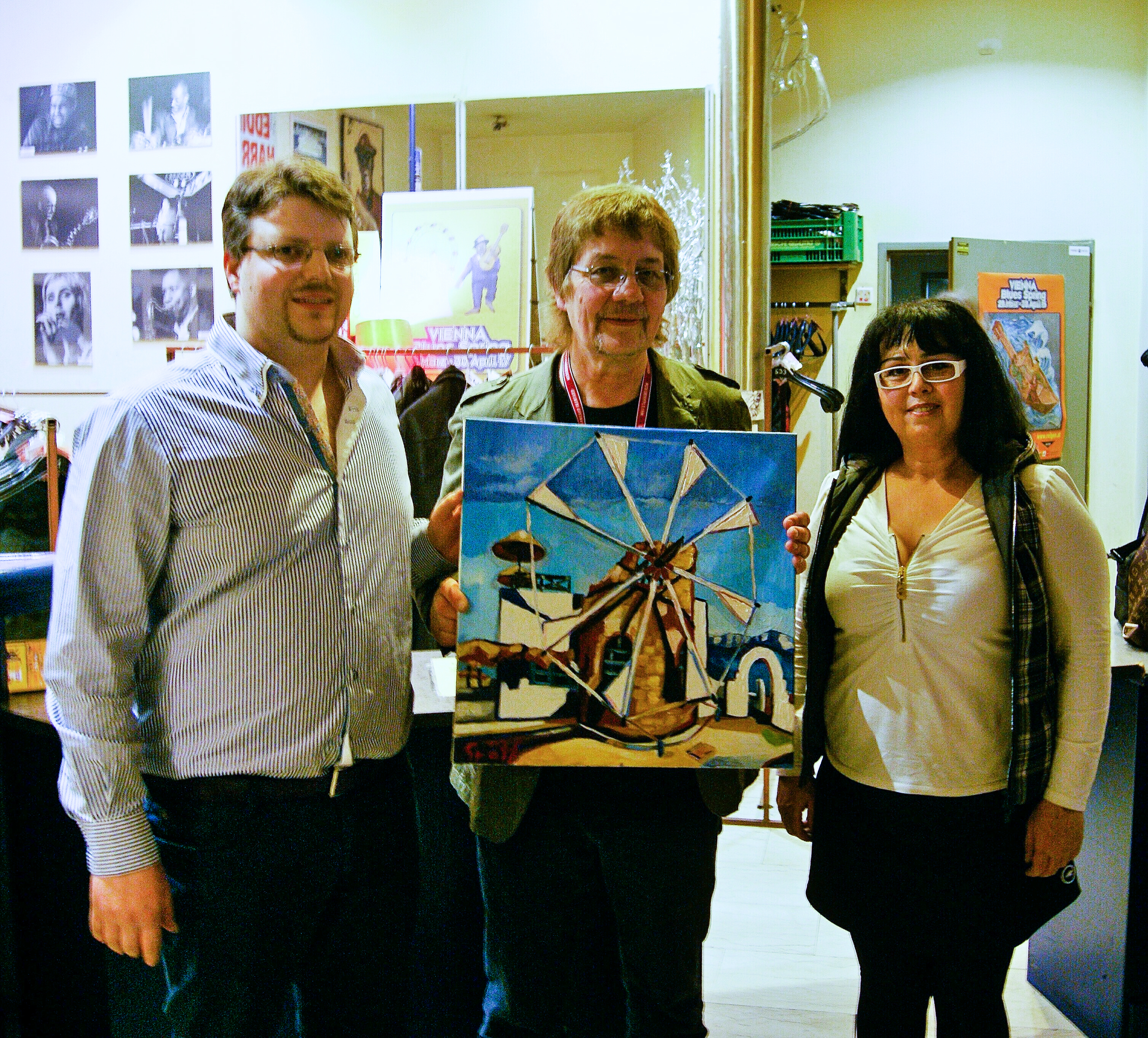 Matthias Laurenz Gräff und Georgia Kazantzidu (Georgia Kazantzidou) im Künstlertreff mit Don Airey, dem Keyboardisten von Deep Purple, und einer Gemäldeüberreichung im Reigen, Wien. 2017